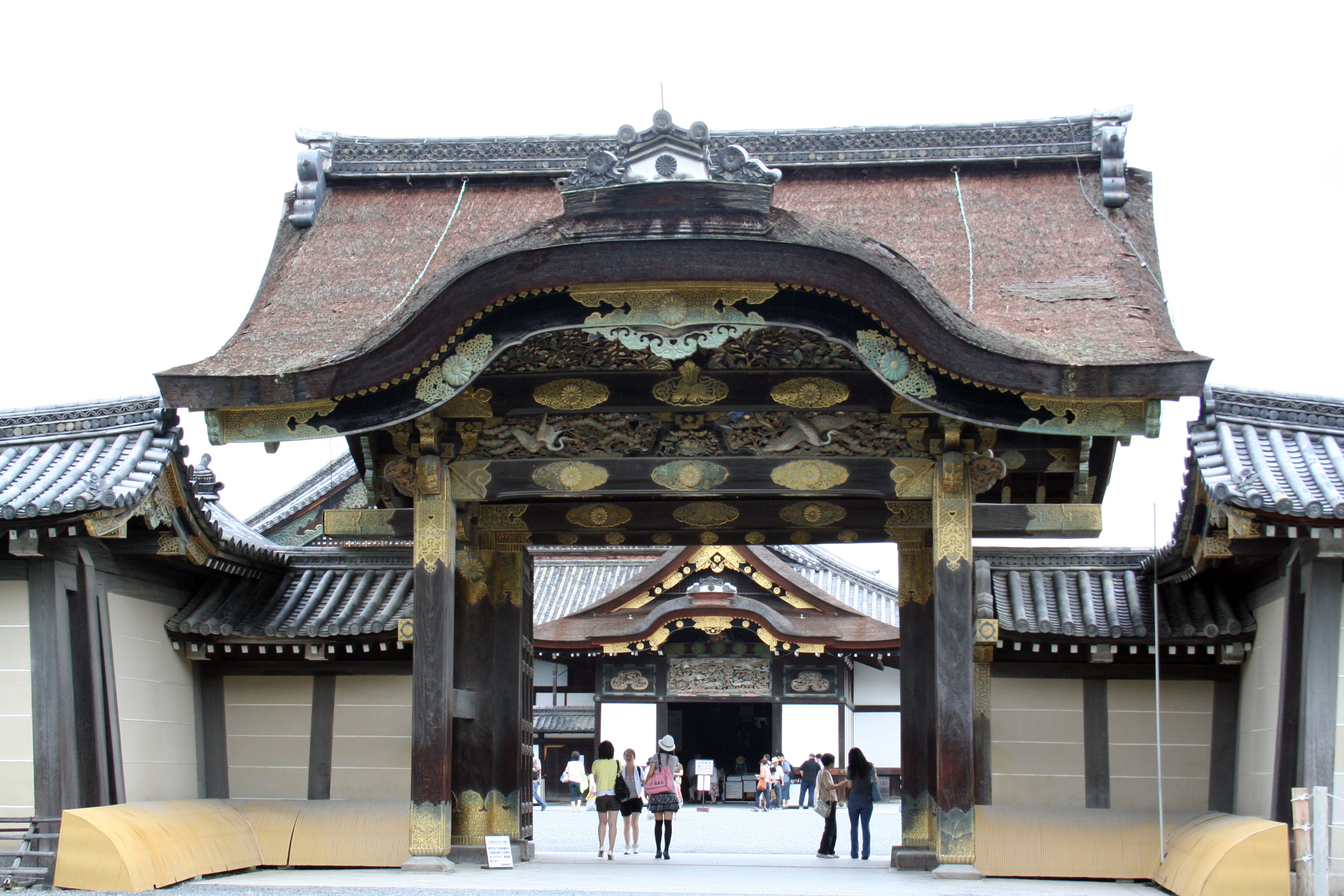 二条城。